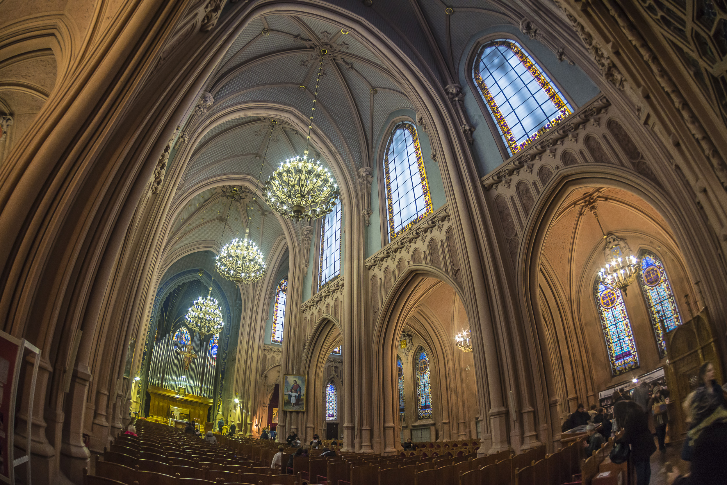 Костьол св. Миколая, Київ, Велика Васильківська вул., 77